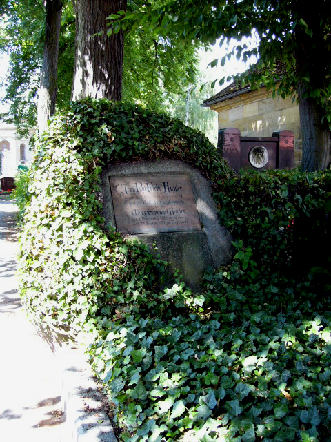 Das Grabmal von Jean Paul auf dem Bayreuther Stadtfriedhof: Der Gedenkstein ein efeuüberwucherter Findling